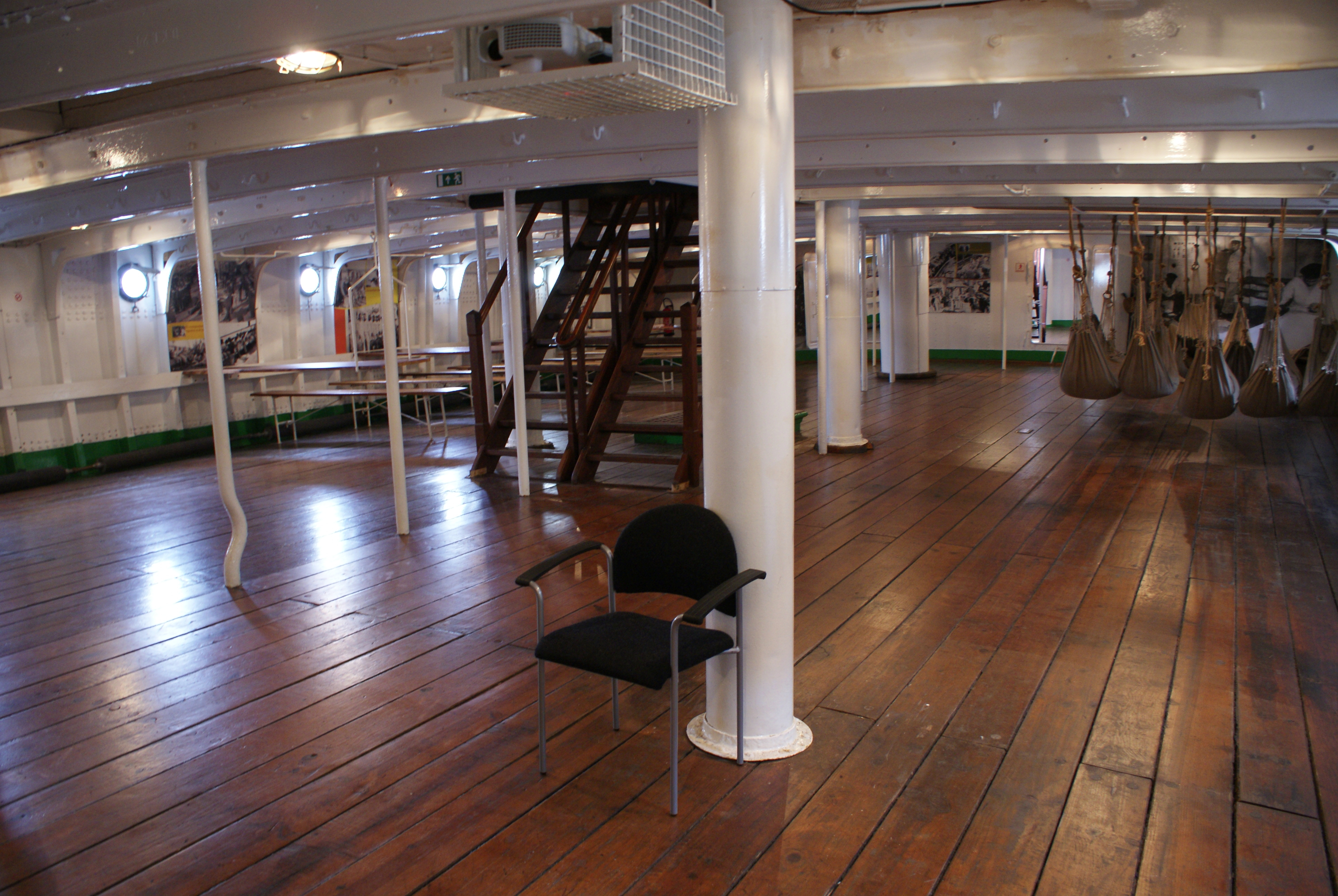 Entrepont du trois-mâts carré Duchesse Anne (Musée portuaire de Dunkerque, Nord, France).